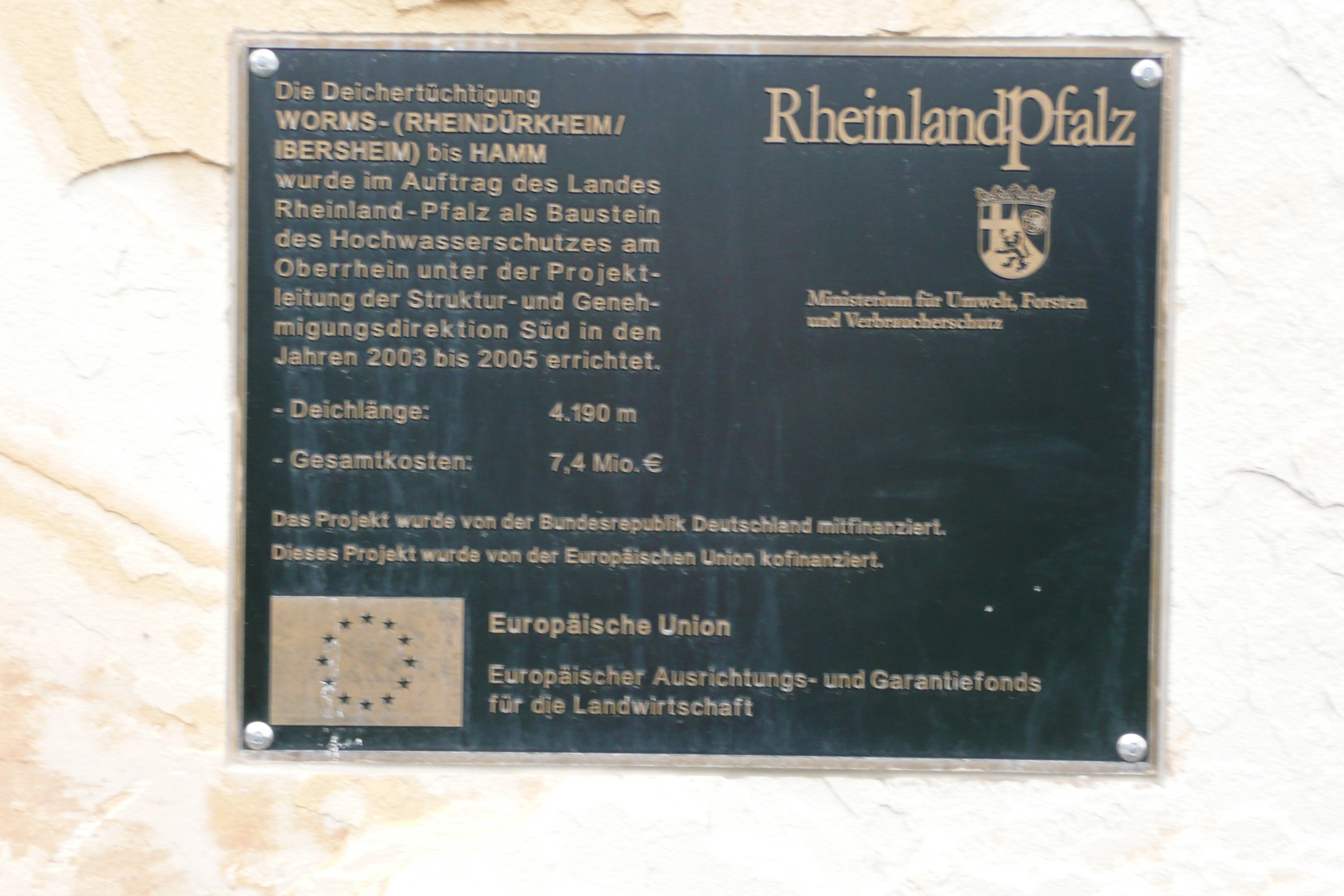 Schild am Rheinhauptdeich